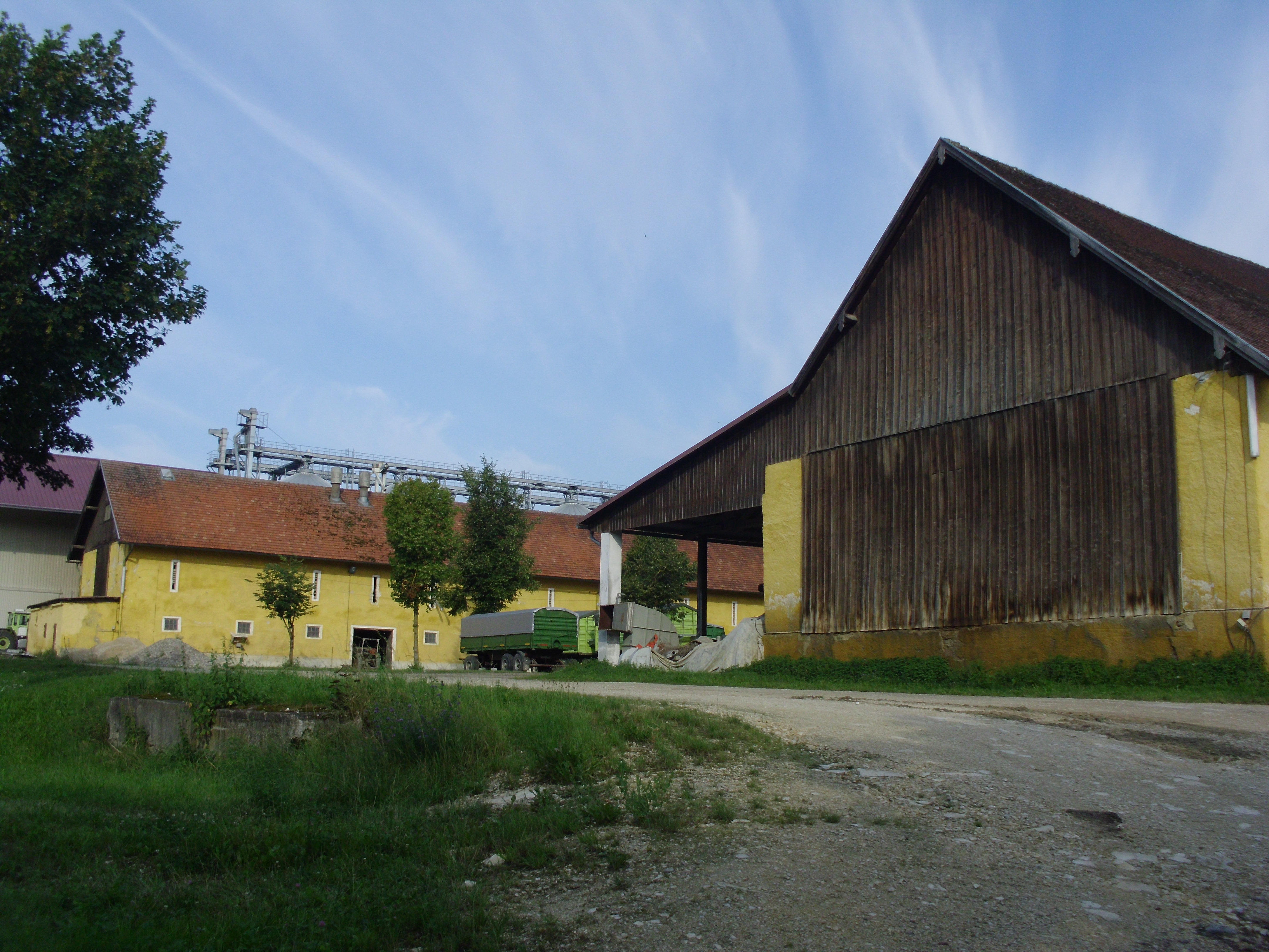 Hofgut Dittenfeld, Ortsteil von Rennertshofen im Landkreis Neuburg-Schrobenhausen, Ökonomiegebäude